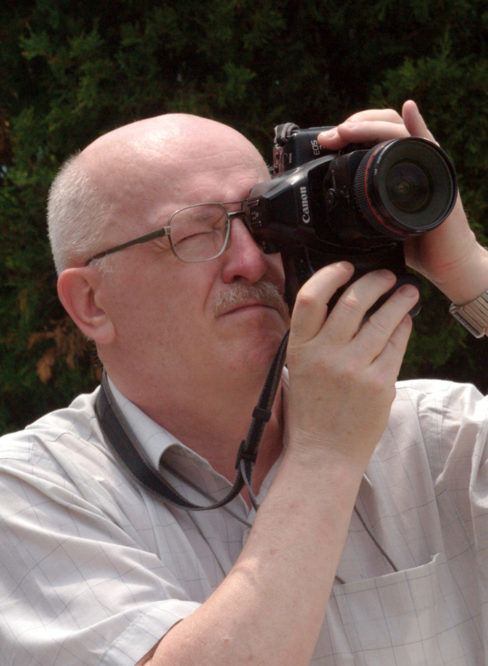 Zdjęcie Juliusza Multarzyńskiego